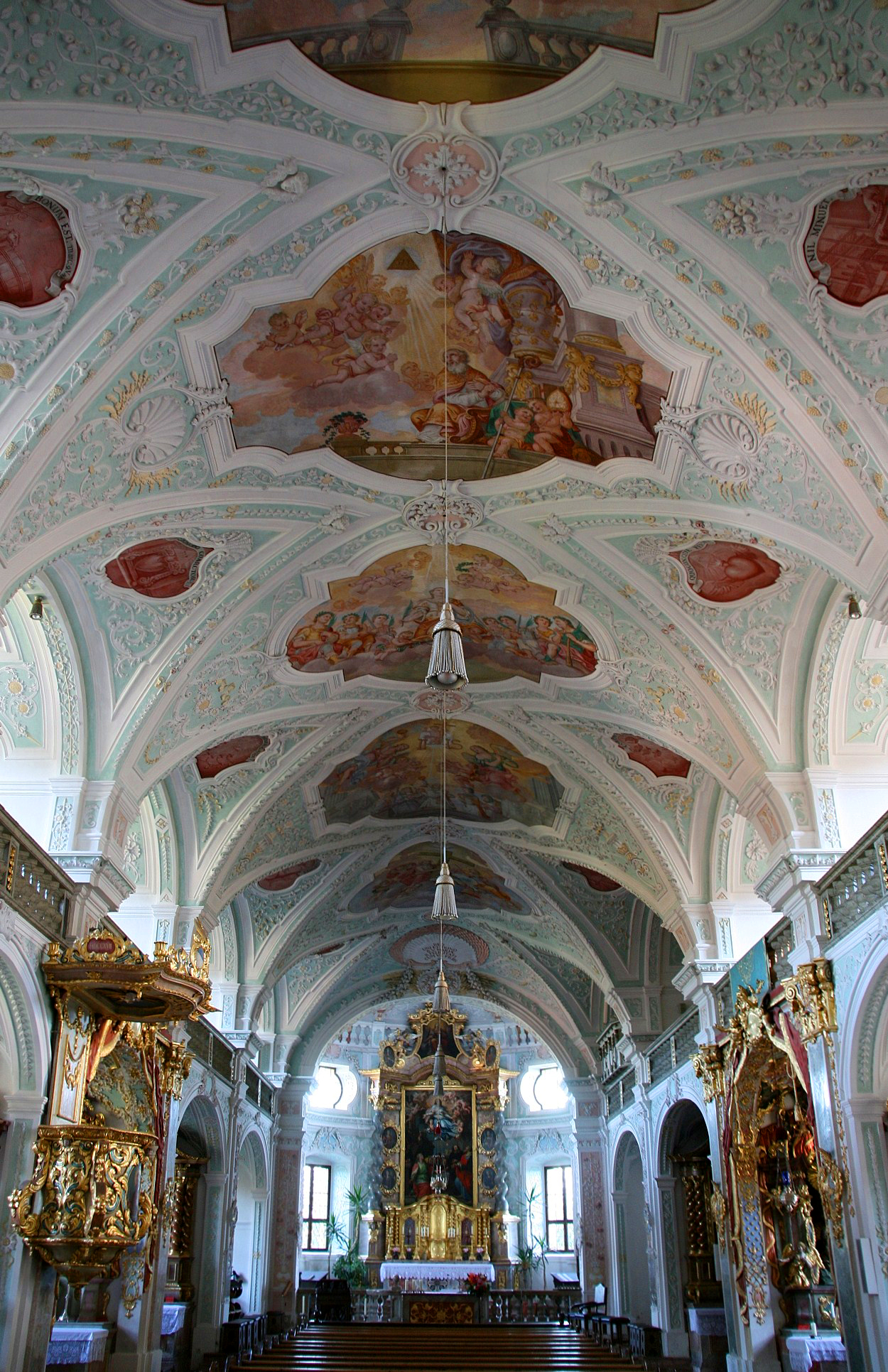 Innenraum der Klosterkirche Au am Inn (Landkreis Mühldorf am Inn, Oberbayern). Blick durch das Langhaus zum Chor mit Hochaltar. Barocke Prachtentfaltung durchzieht den gesamten Kirchenraum.